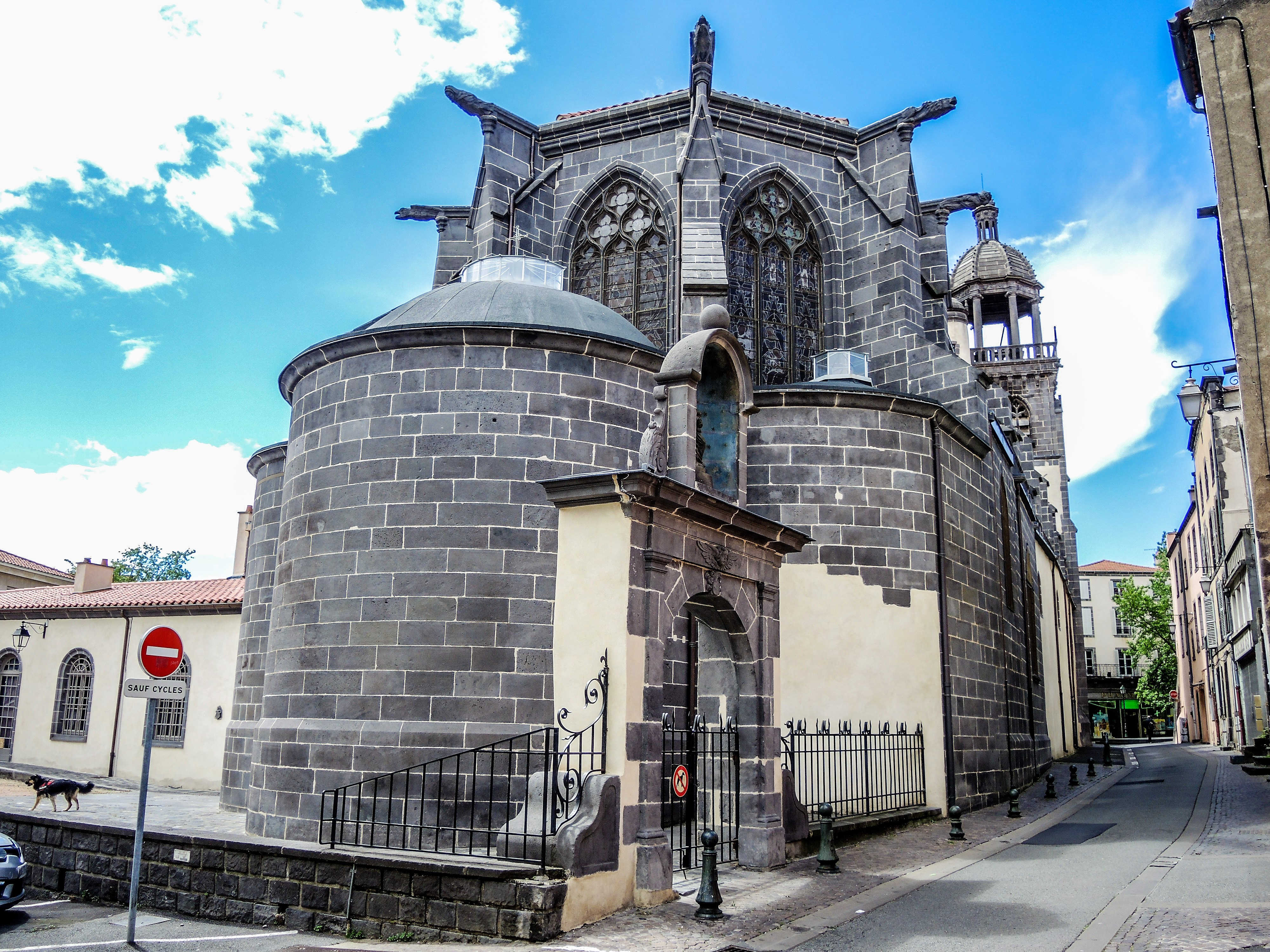 Vue arrière de l'église